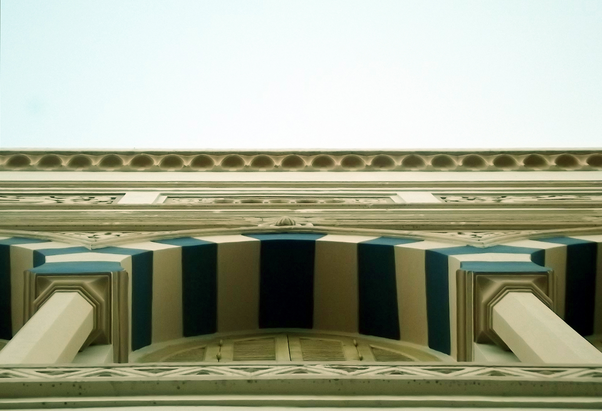 احد نوافذ دار اوبرا دمنهور